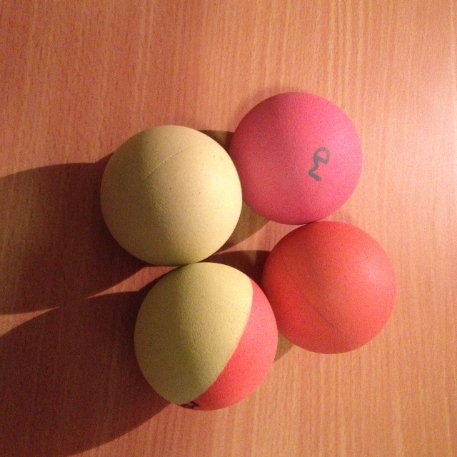 "baluni" za picigin i picigol